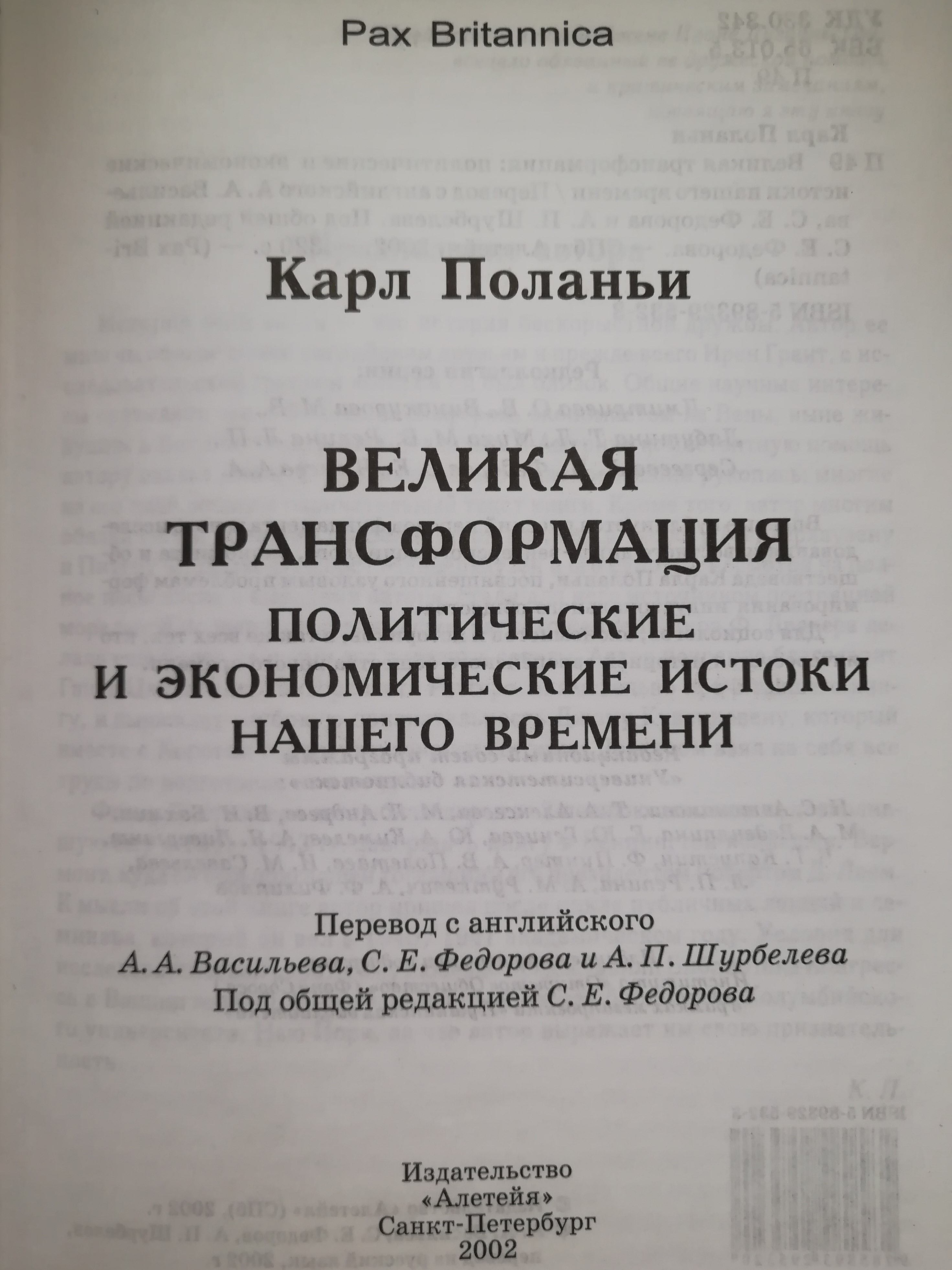 Титульный лист книги "Великая трансформация"